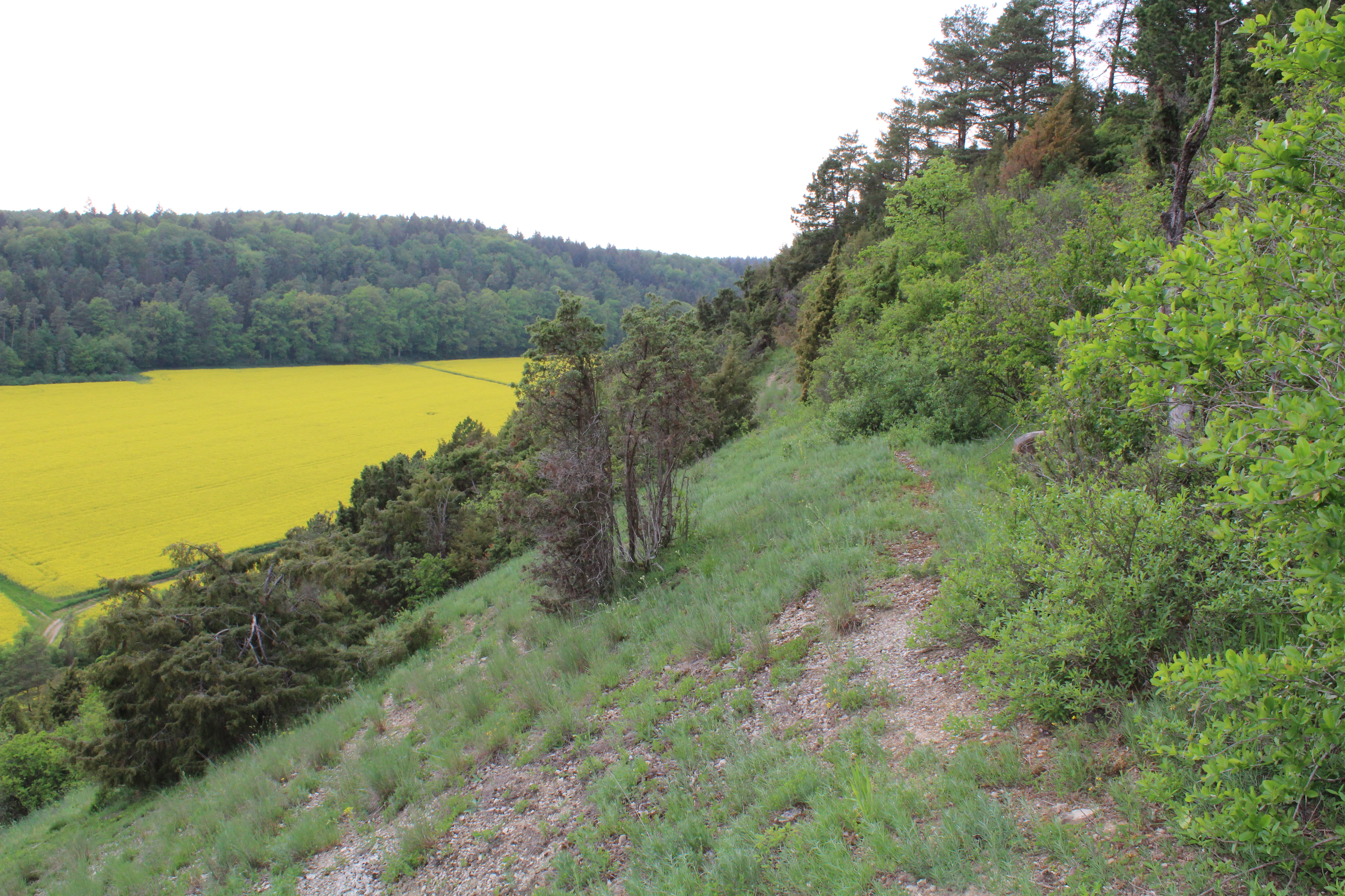 Naturschutzgebiet Hunsenberg in Tauberbischofsheim im Main-Tauber-Kreis, Baden-Württemberg, Deutschland